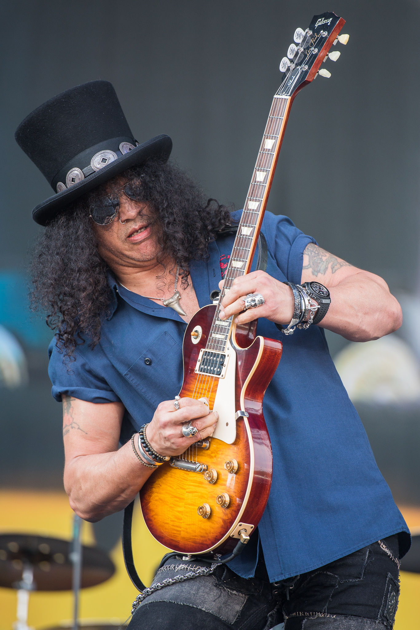 ARGO-Konzerte,Festival,Konzert,Livekonzert,Livemusik,Musik,RiP,Rock im Park 2015,Saul Hudson,Seat Zeppelin Stage,Slash feat. Myles Kennedy & The Conspirators